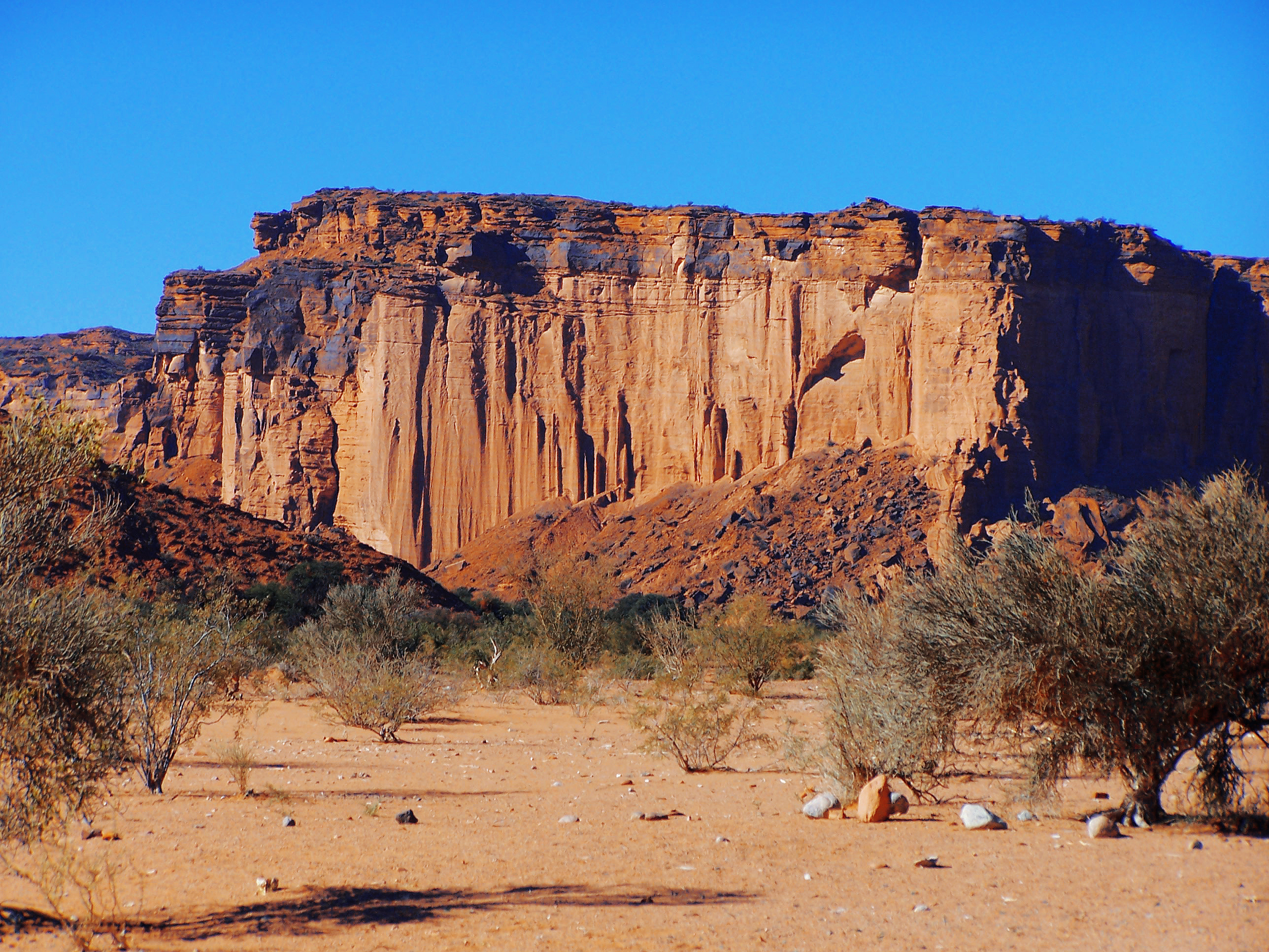 Cañon de Talampaya